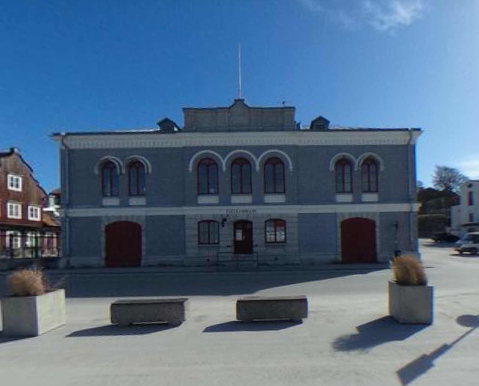 Tullhuset i Visby, Skeppsbron 18.